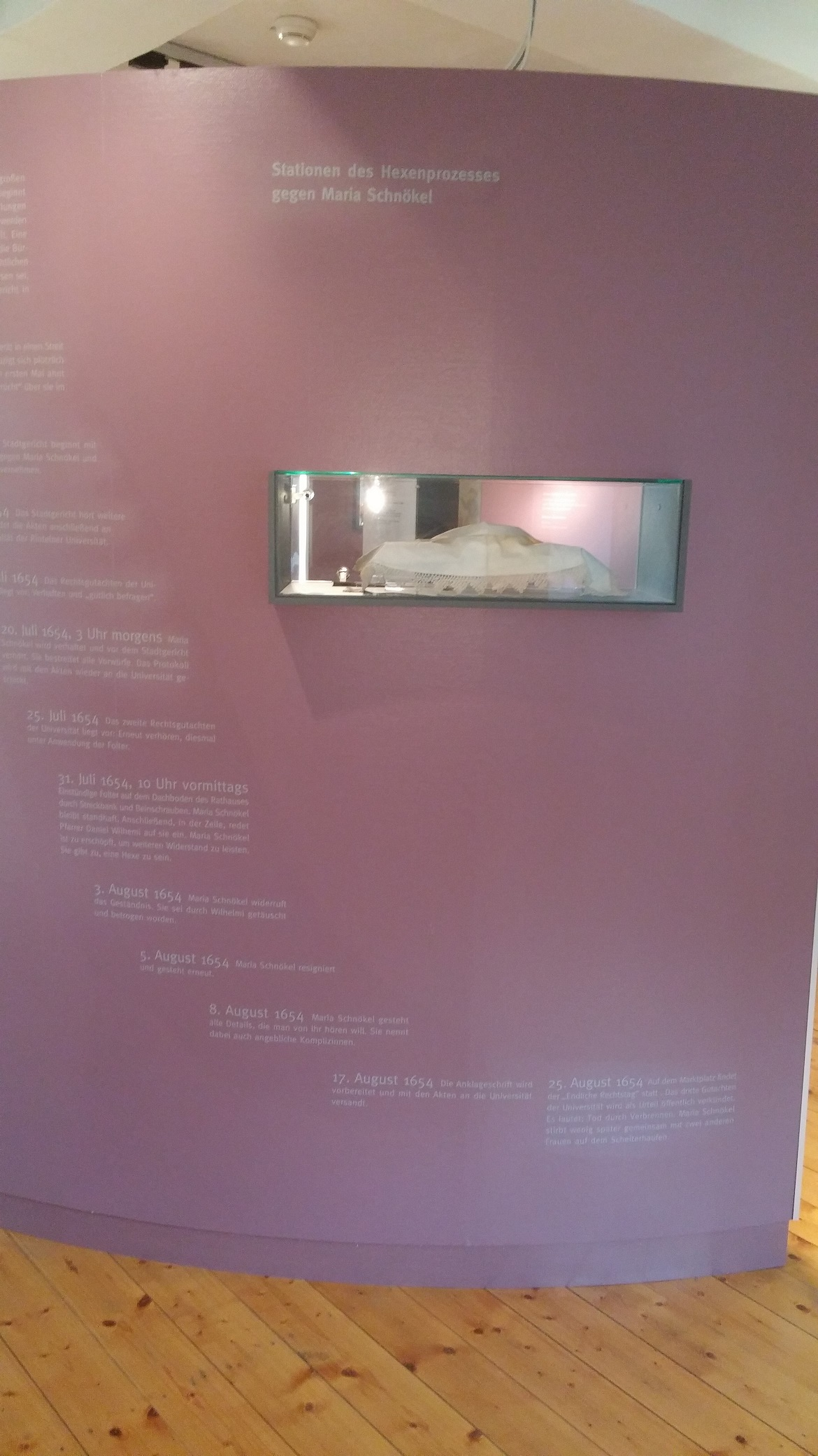 Eulenburg Museum: Stationen im Hexenprozess gegen Maria Schnökel Rinteln 1654